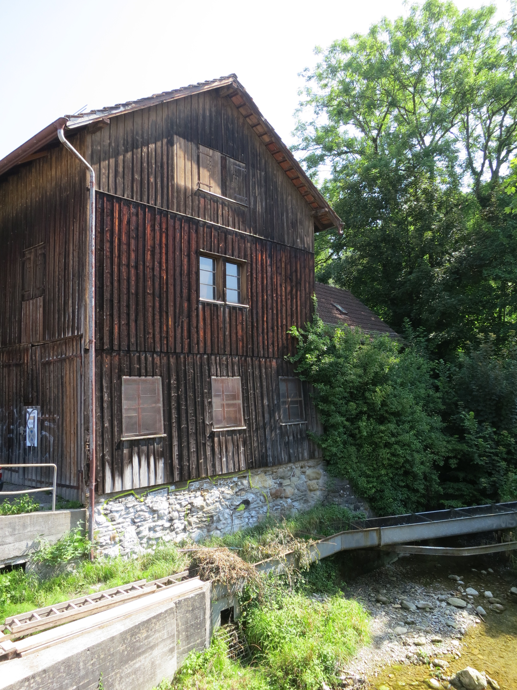 Farbholzmühle Burgwies, Zürich-Hirslanden